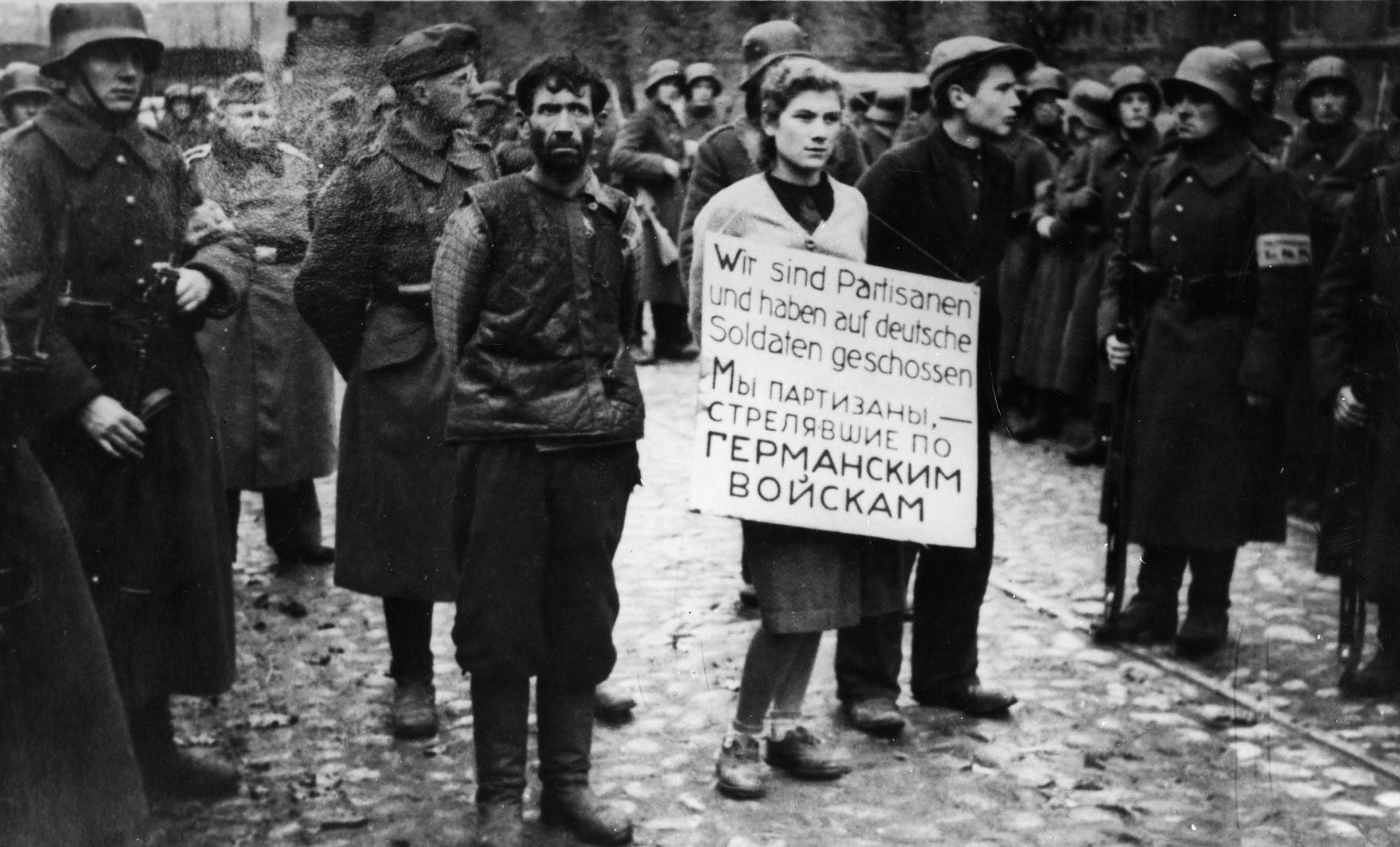 Résistante russe juive, pendue par les allemands le 26 octobre 1941. Photographie prise par un photographe lithuanien collaborateur des Nazis. Non identifié à ce jour.